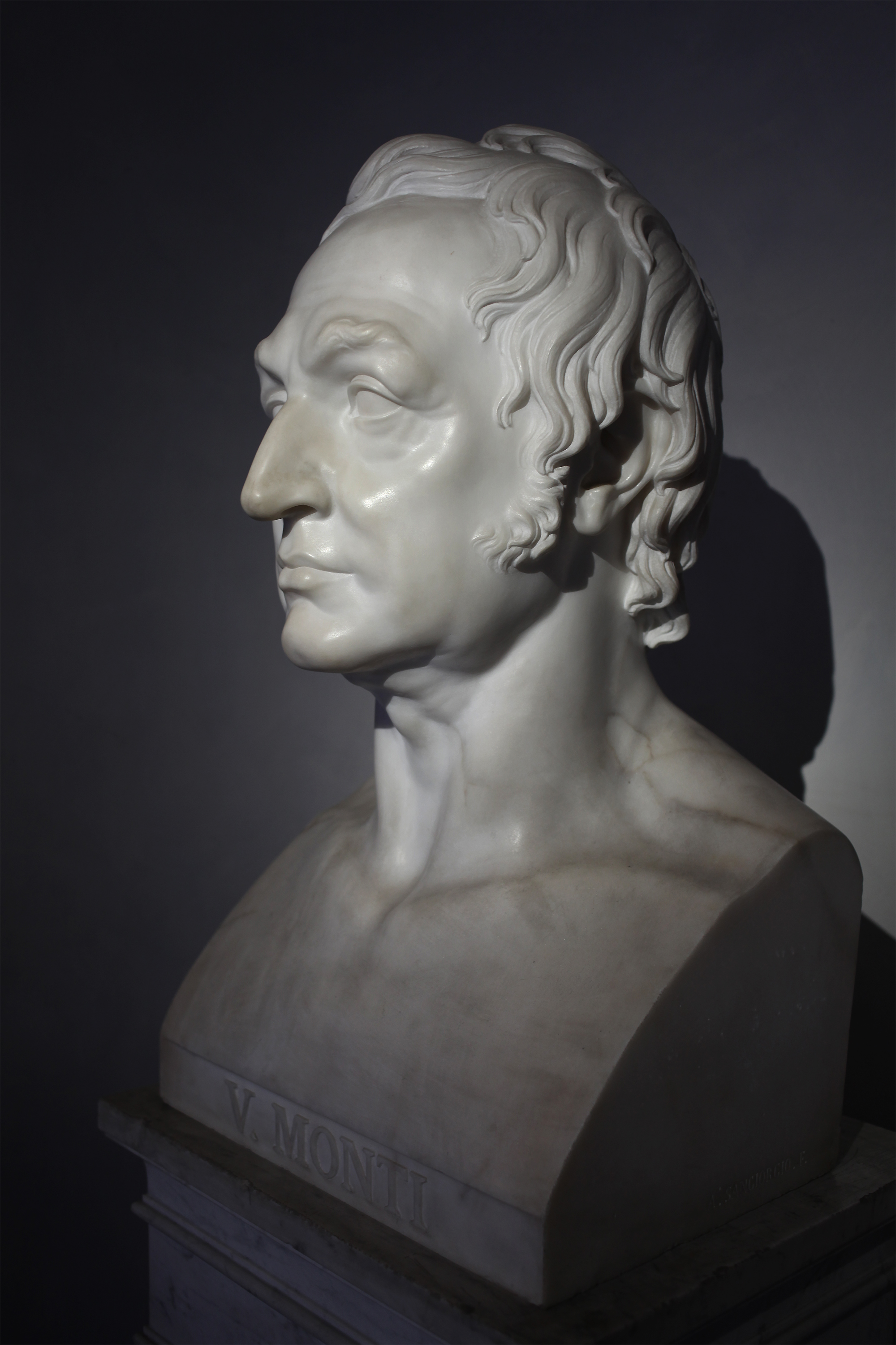 Abbondio Sangiorgio (1798-1879) Busto di Vincenzo Monti (1833), marmo; deposito Pinacoteca di Brera, 1902. Fotografata alla mostra Canova, i volti ideali, Galleria d'Arte Moderna di Milano 2019-2020. Il busto, circa due volte la dimensione naturale, è copia dell'originale in bronzo del 1833 che componeva un cenotafio al Monti progettato da Pelagio Palagi, modellato da Sangiorgio e gettato in bronzo da Luigi Manfredini e posto nel loggiato del palazzo di Brera. Il busto in marmo qui rappresentato fu commissionato, sempre nel 1833, dall'Università di Ferrara